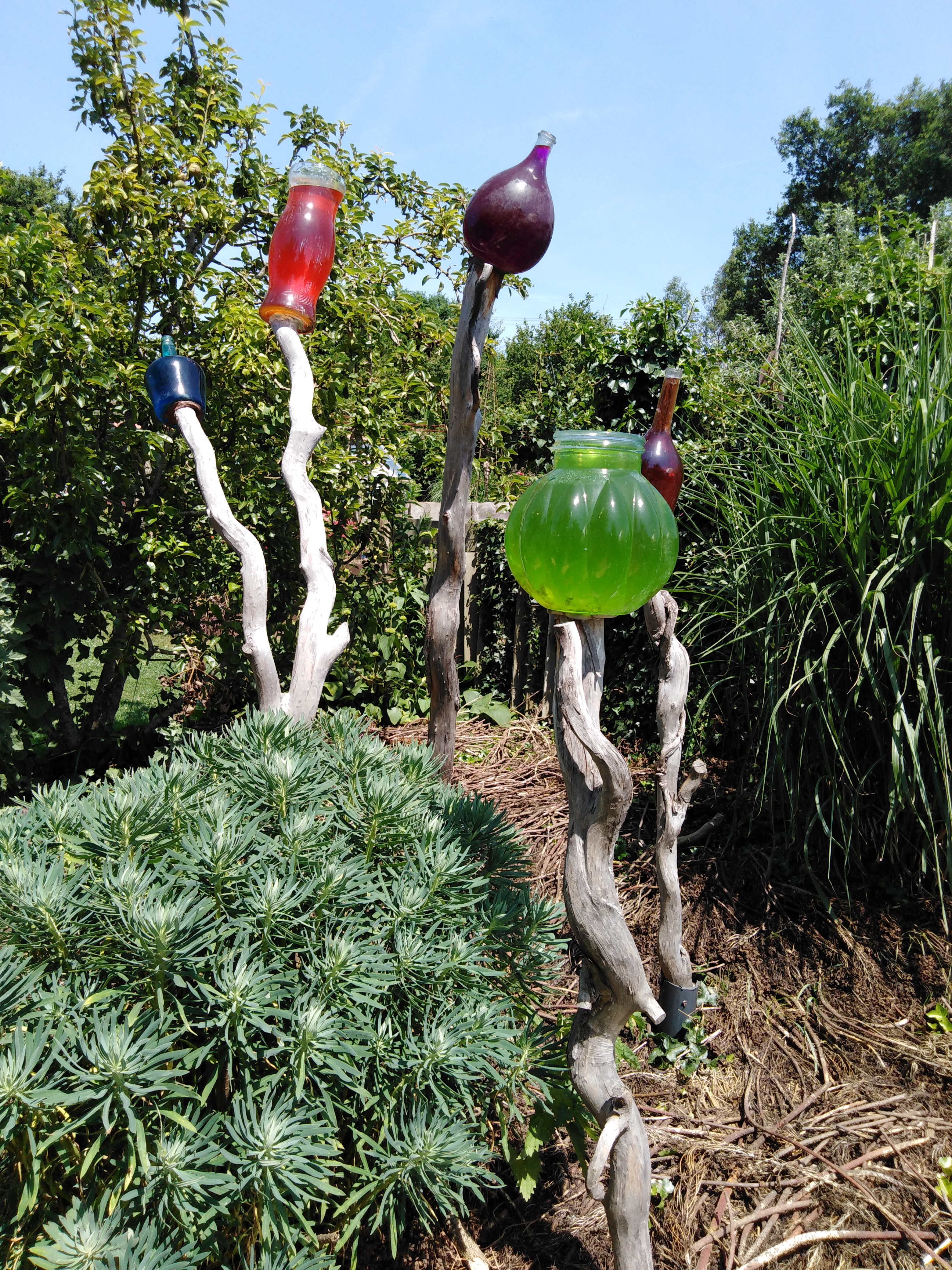 Jardins Rocambole, Corps-Nuds, France, 7-2019, dame-jeannes colorées recyclées en jardin potager